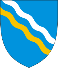 Saksi valla vapp